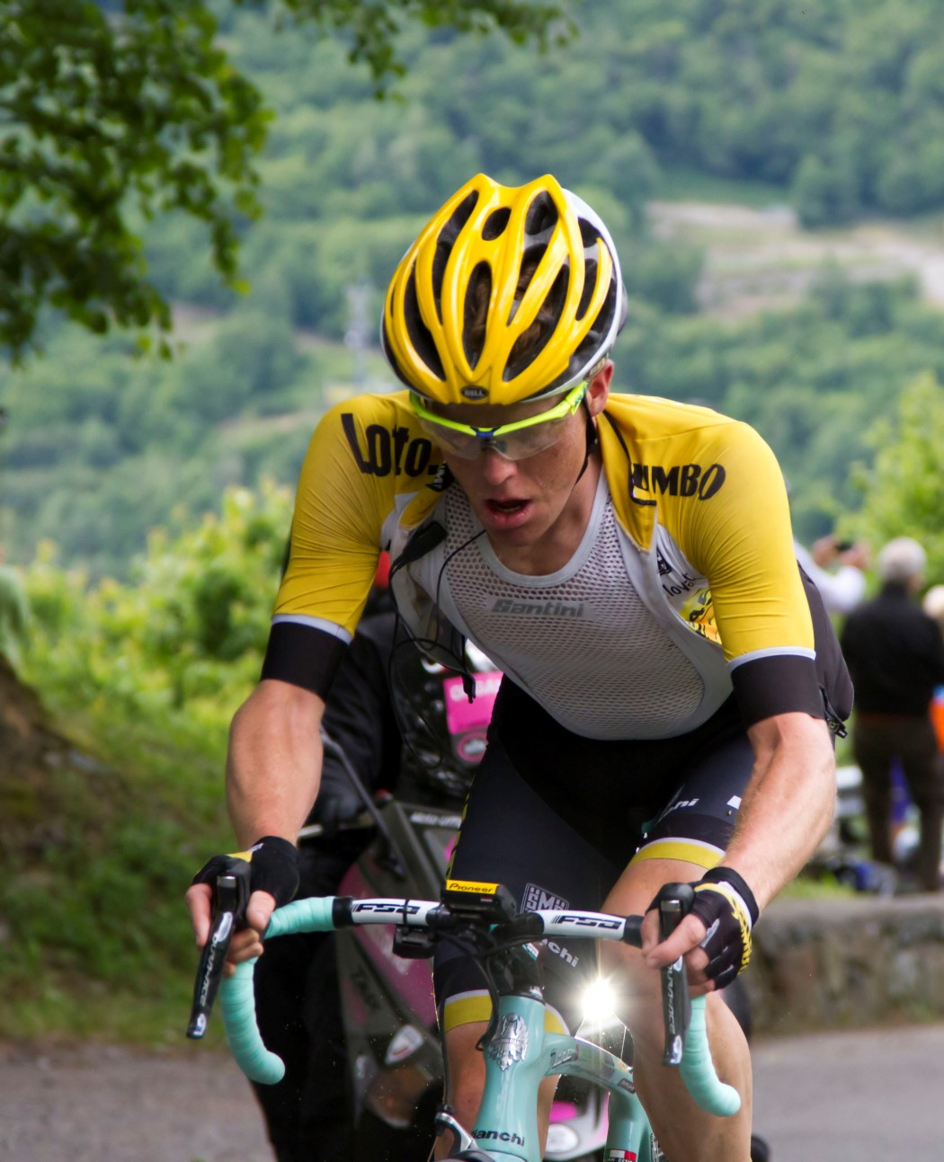 kruiswijk